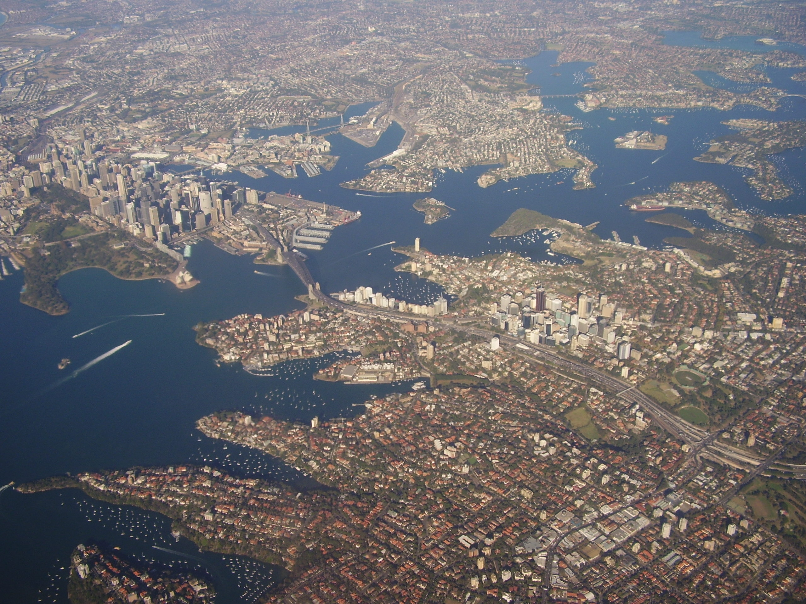 Sydney